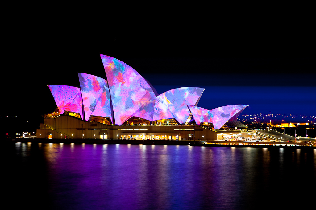 Vivid Sydney 2010